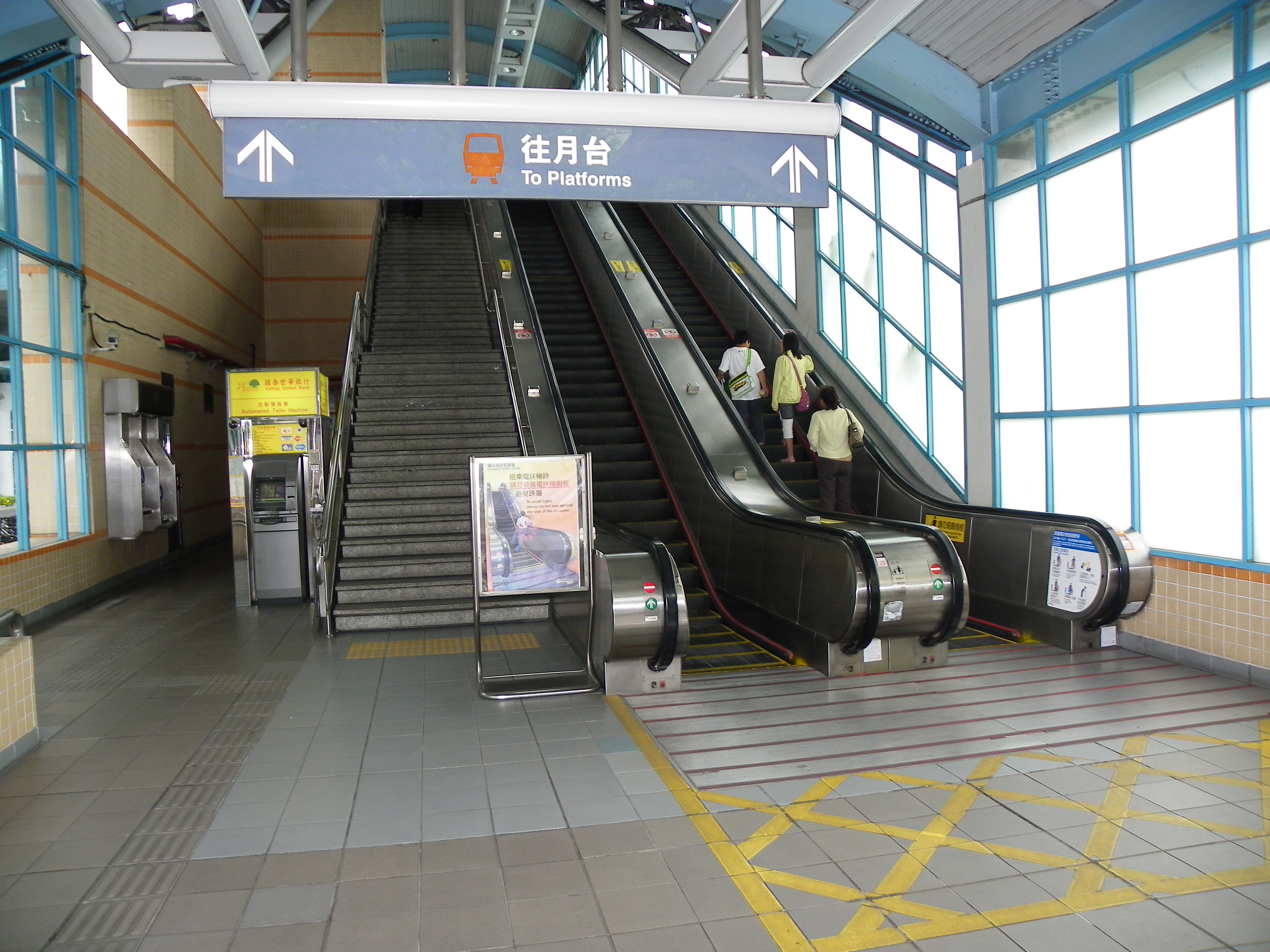 台北捷運線六張犁駅出口と国泰世華銀行ATM。